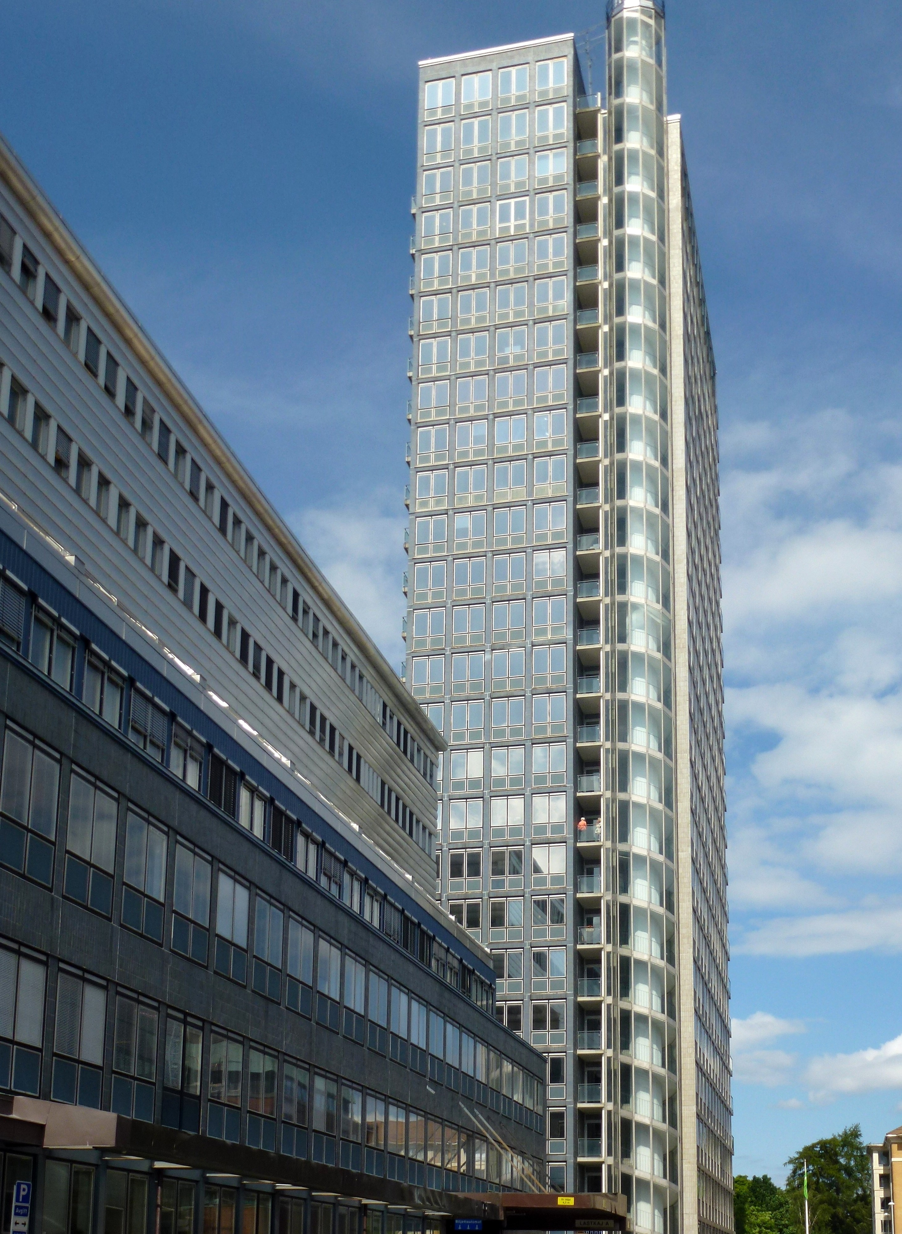 Paul Hedqvist, kontorshus för DN